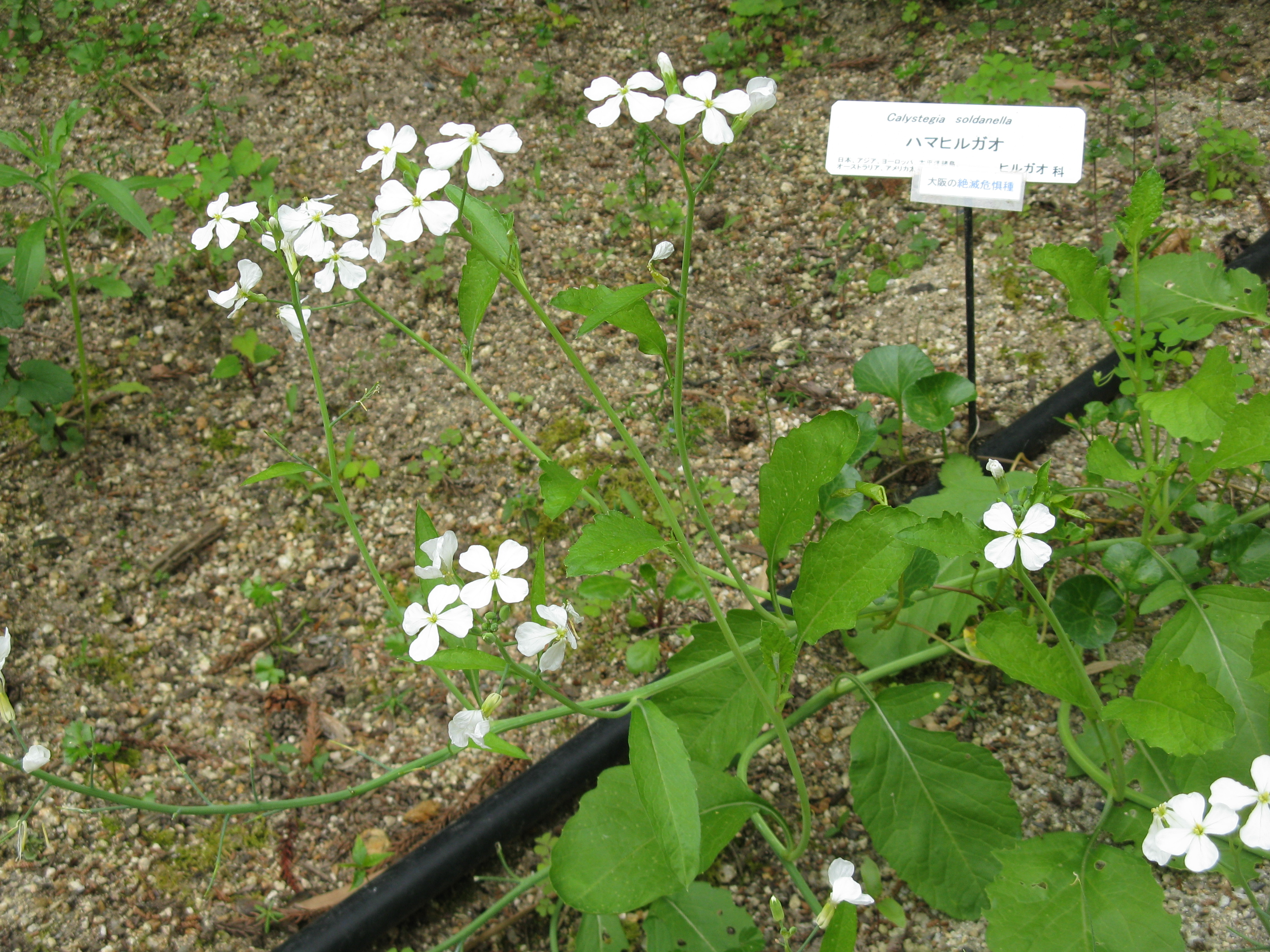 Scientific name Raphanus sativus var. raphanistroides